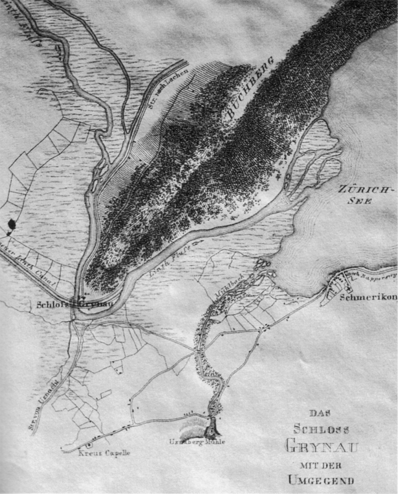 Das Schloss Grynau mit der Umgegend